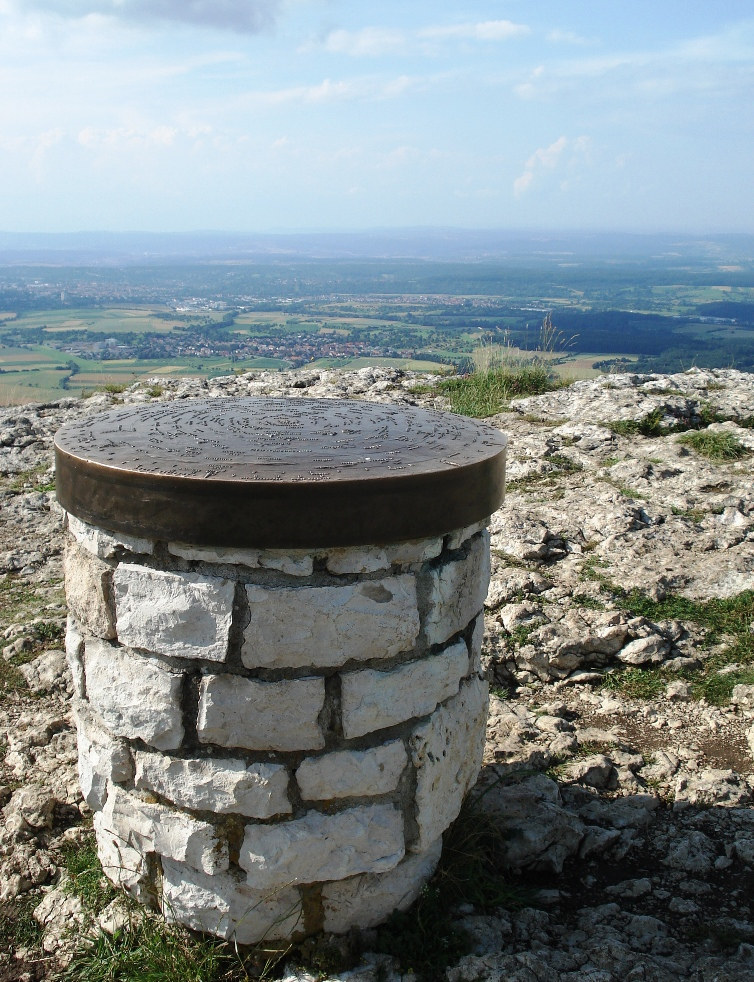 Die Informationstafel auf dem Breitenstein